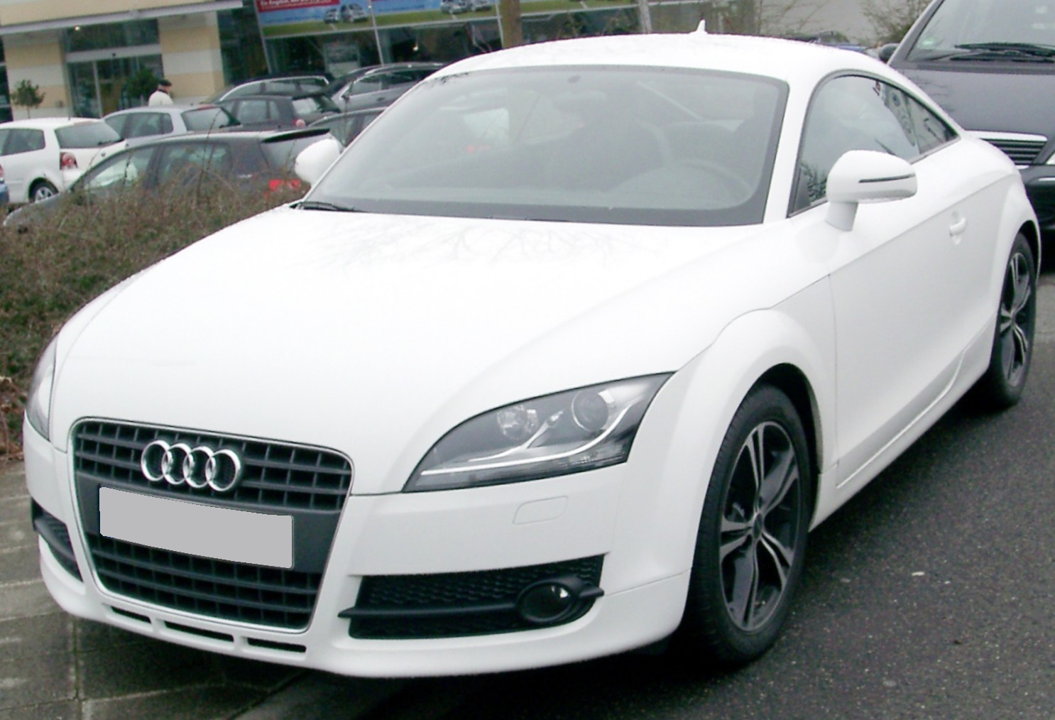 Audi TT, 2. Generation